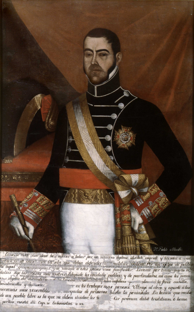 "Pablo Morillo" (comandante de la expedición pacificadora)